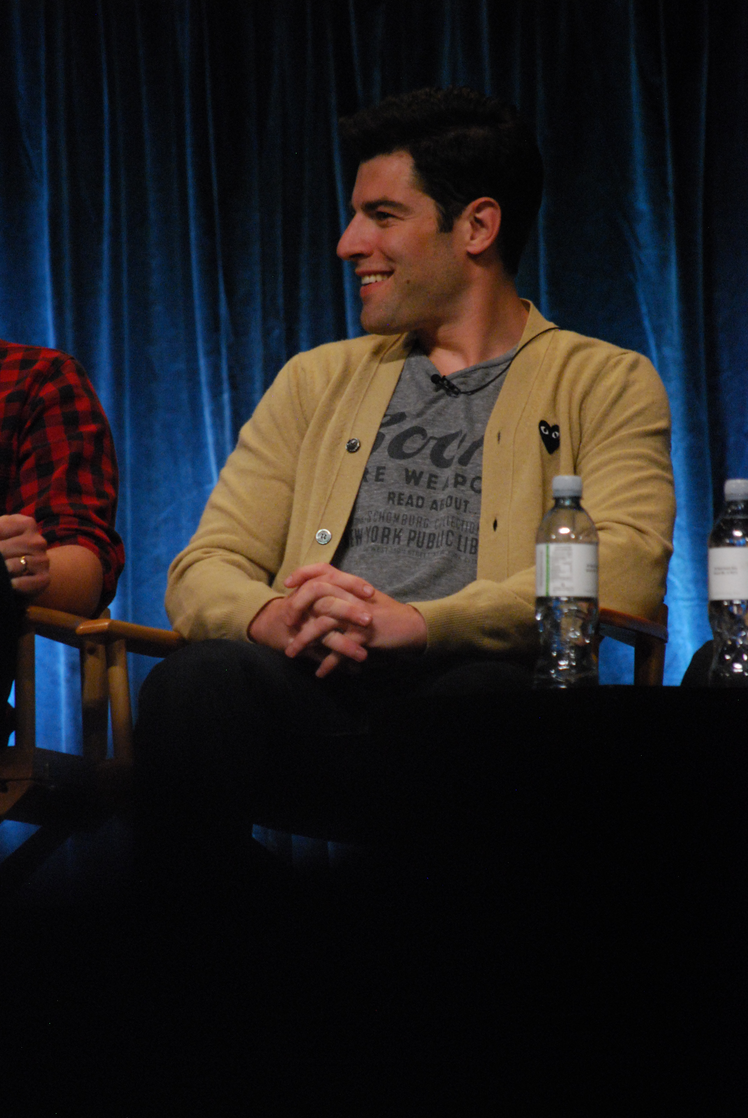 Max Greenfield